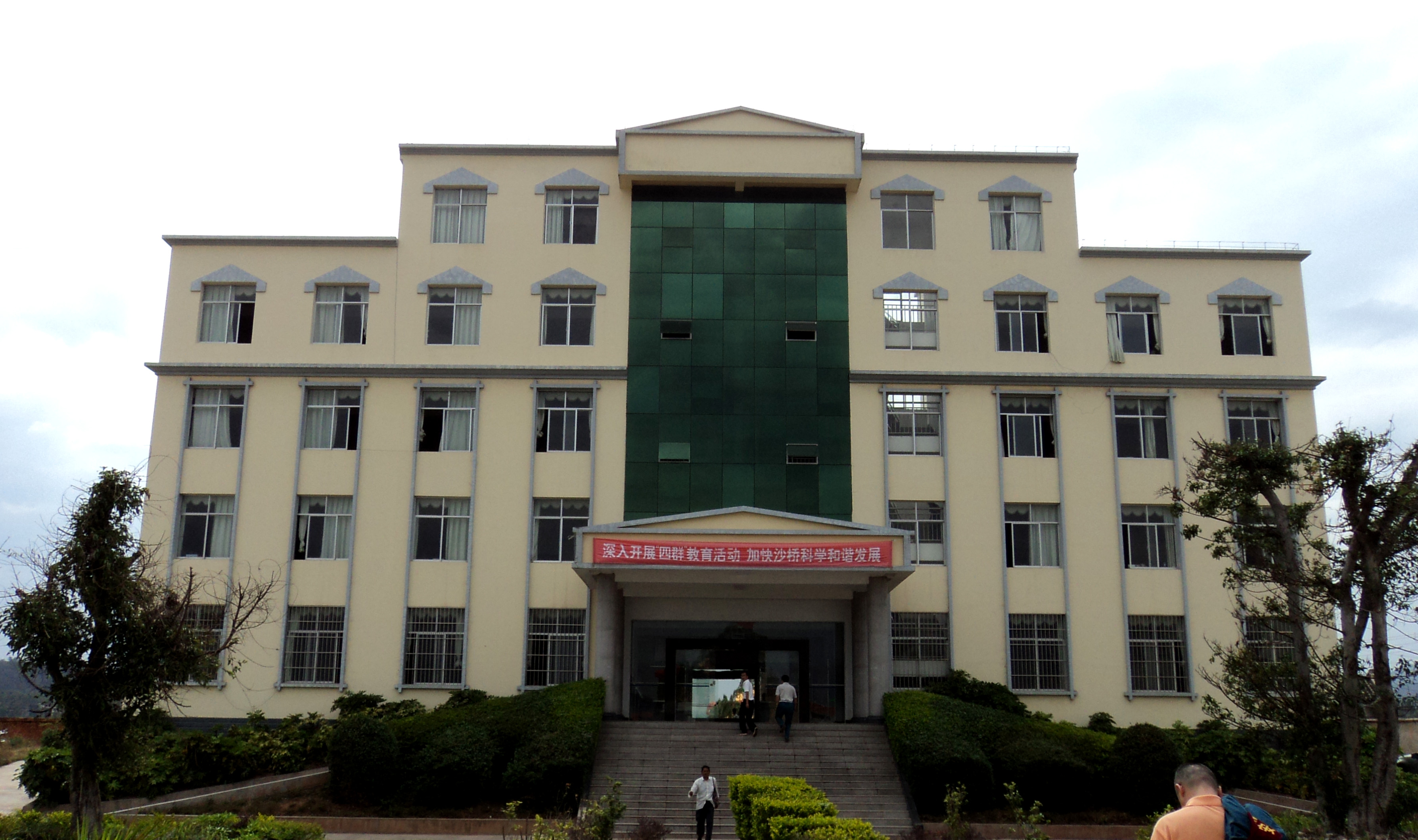 中国云南省南华县沙桥镇镇政府。